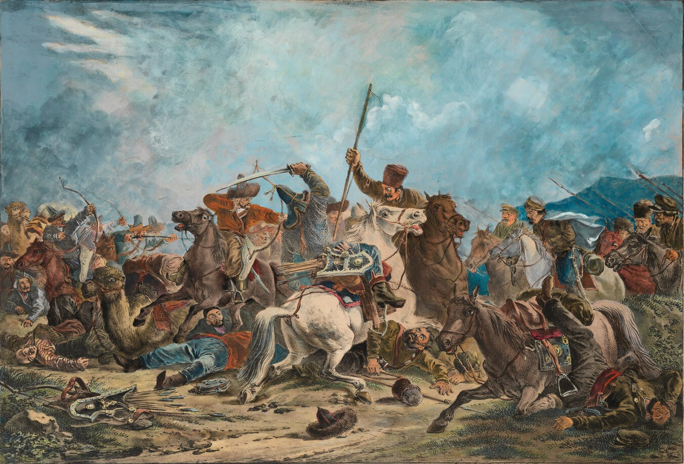 Битва_казаков_с_киргизамиКатегория:Уральское казачье войско